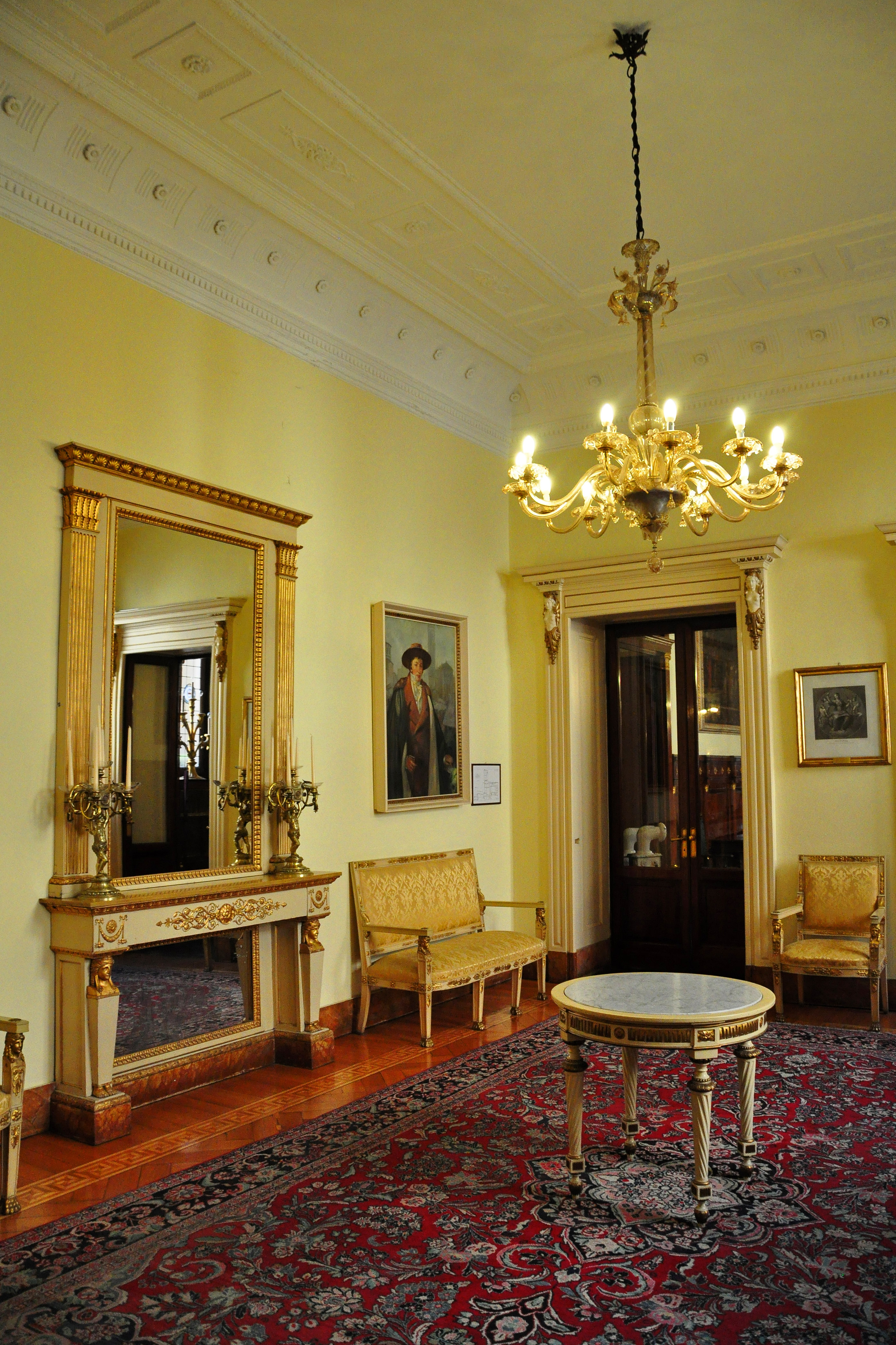 Sala interna del palazzo Spinola a Milano